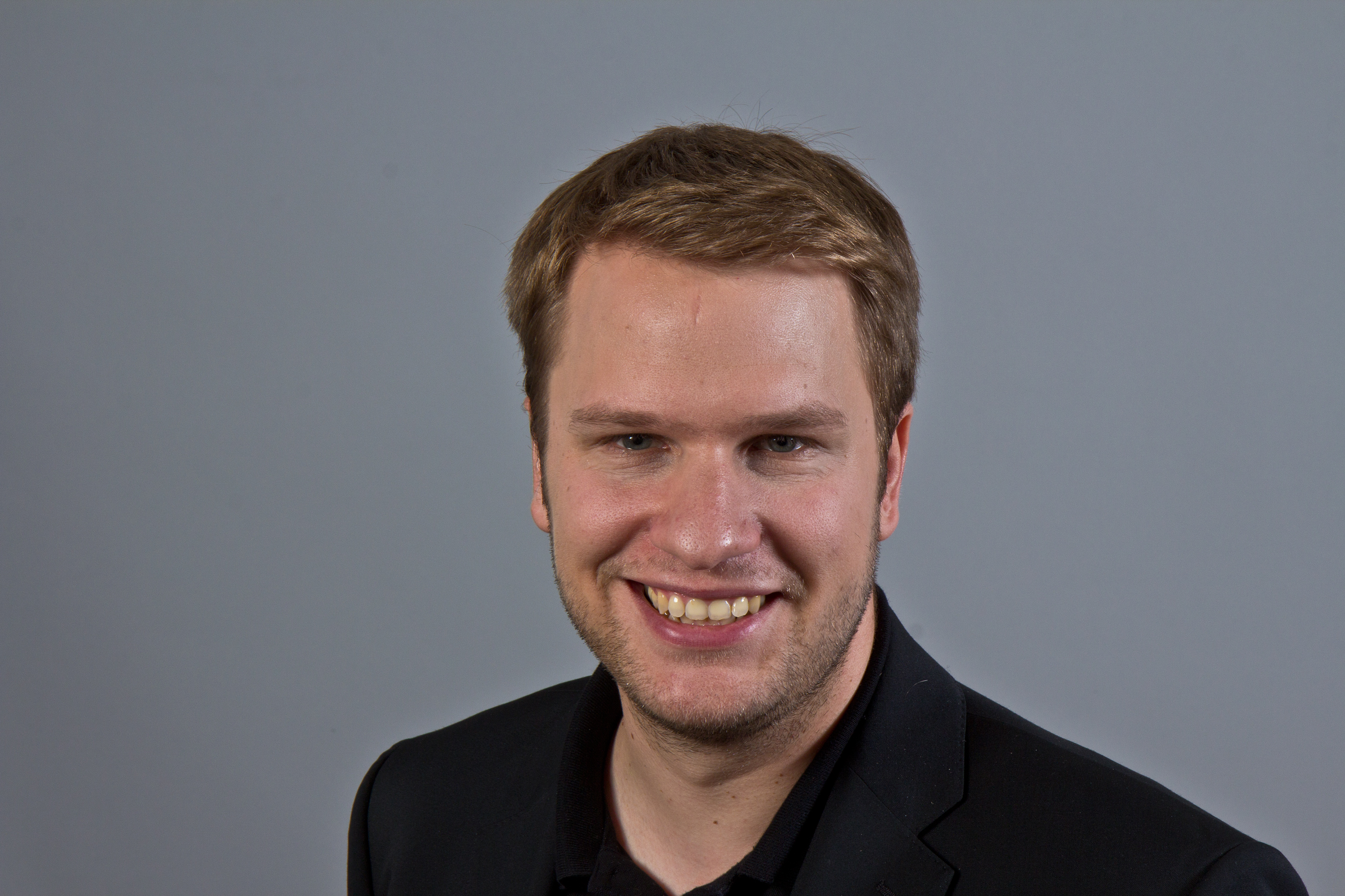 Christopher Vogt (* 4. Januar 1984 in Bad Oldesloe) ist ein deutscher Politiker (FDP) und Mitglied des Landtages von Schleswig-Holstein. Wikipedia im Landtag – Schleswig-Holstein 21.–23. August 2013 in Kiel Fragen zur Nachnutzung Wenn Sie Fragen zur Nachnutzung dieses Bildes haben, können Sie sich jederzeit gern an wenden Personality rights warning Although this work is freely licensed or in the public domain, the person(s) shown may have rights that legally restrict certain re-uses unless those depicted consent to such uses. In these cases, a model release or other evidence of consent could protect you from infringement claims.